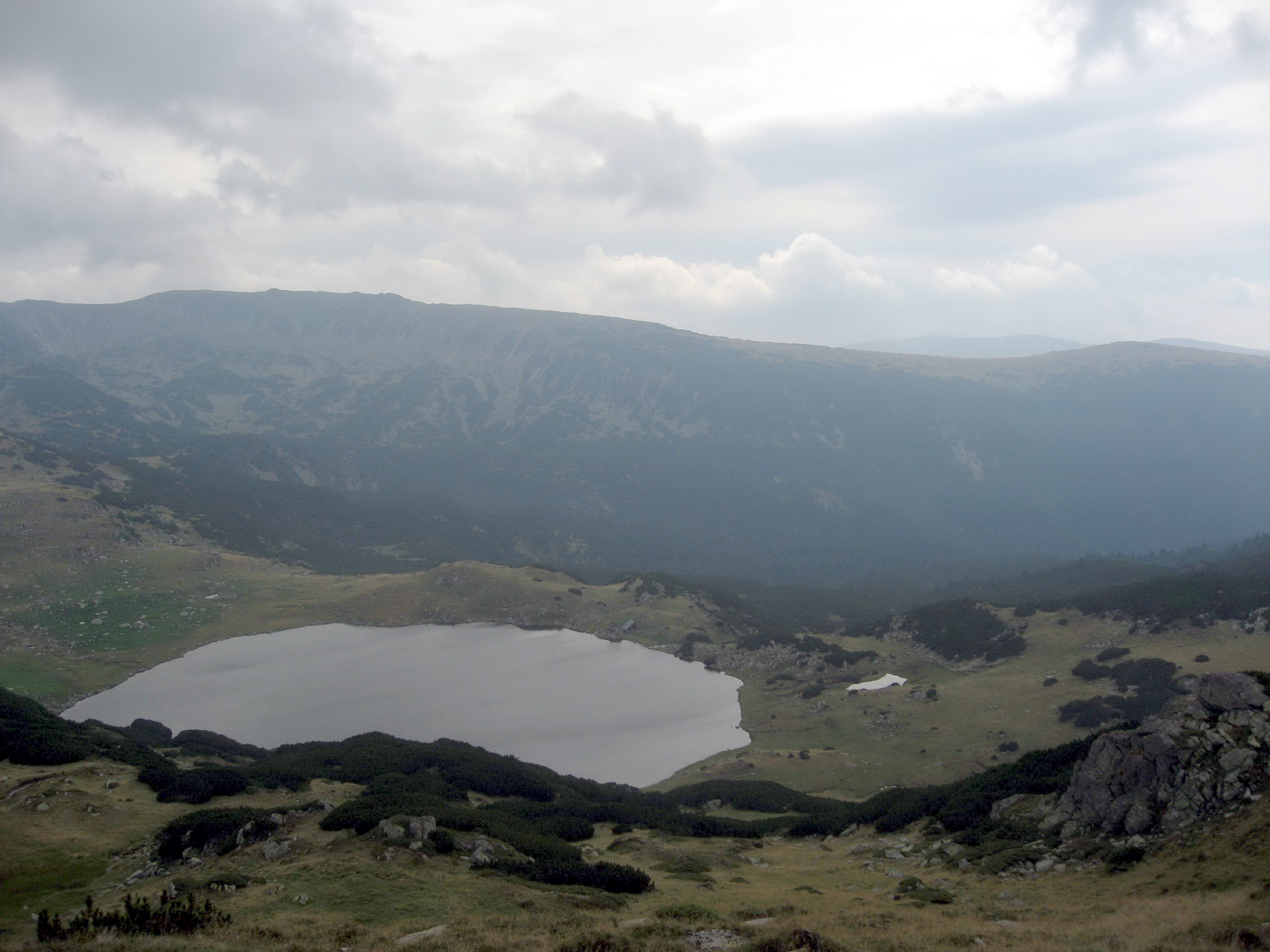 Jezero Zanoaga